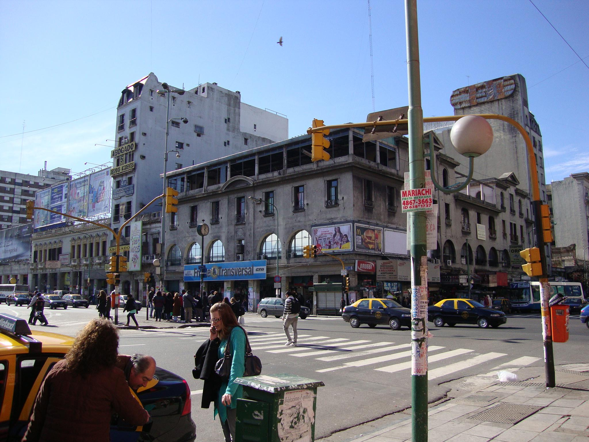 Cuadra del 0 al 100 de Avenida Pueyrredón, frente a la Plaza Miserere (o Plaza Once de Septiembre). Todos los edificios comparten una antigua recova que cubre la vereda, con locales comerciales. Buenos Aires, Argentina.